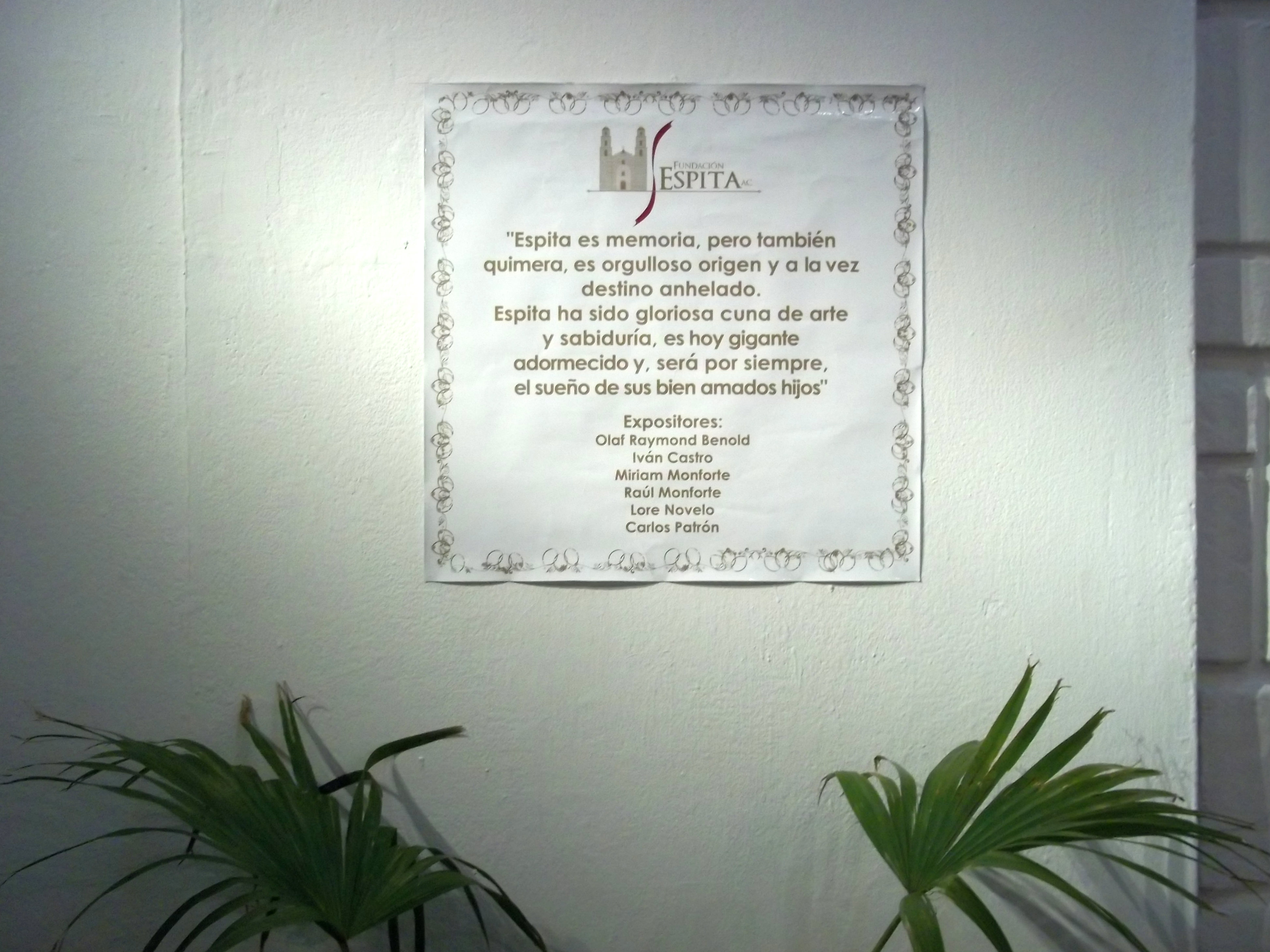 Cartel al inicio de la exposición fotográfica "Espita de mis amores" en la ciudad de Mérida, Yucatán.